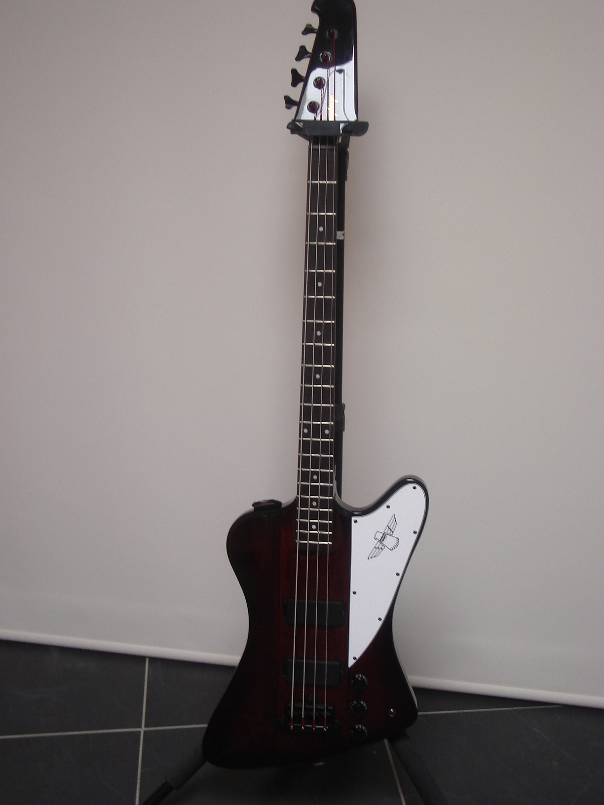 Epiphone Thunderbird Vintage Sunburst